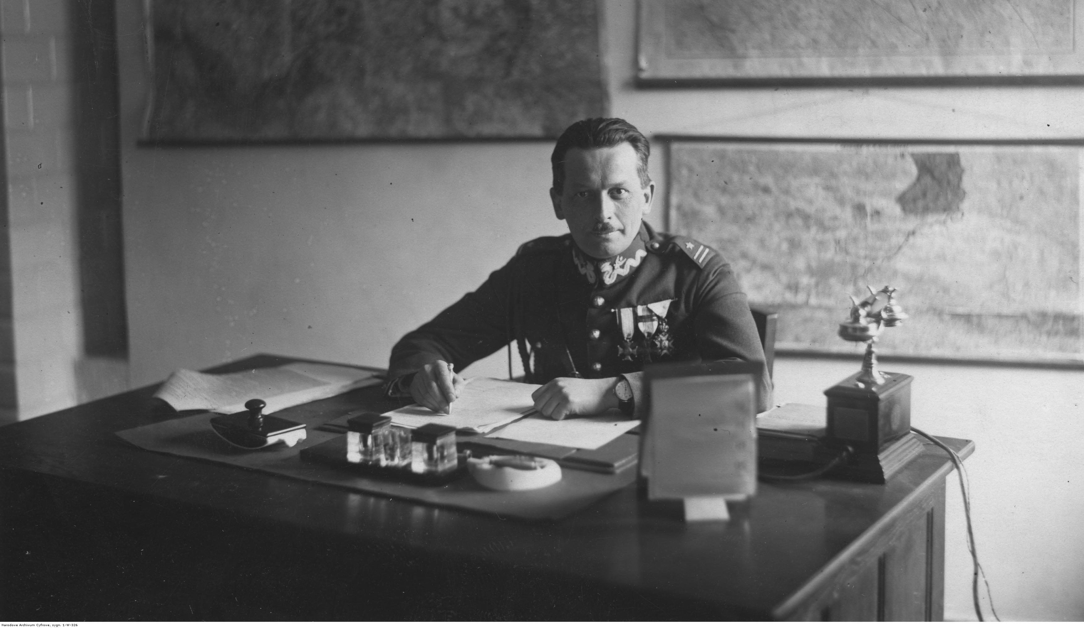 Major Artur Maruszewski, szef sztabu KOP-u, za biurkiem. Koncern Ilustrowany Kurier Codzienny - Archiwum Ilustracji. Sygnatura: 1-W-326